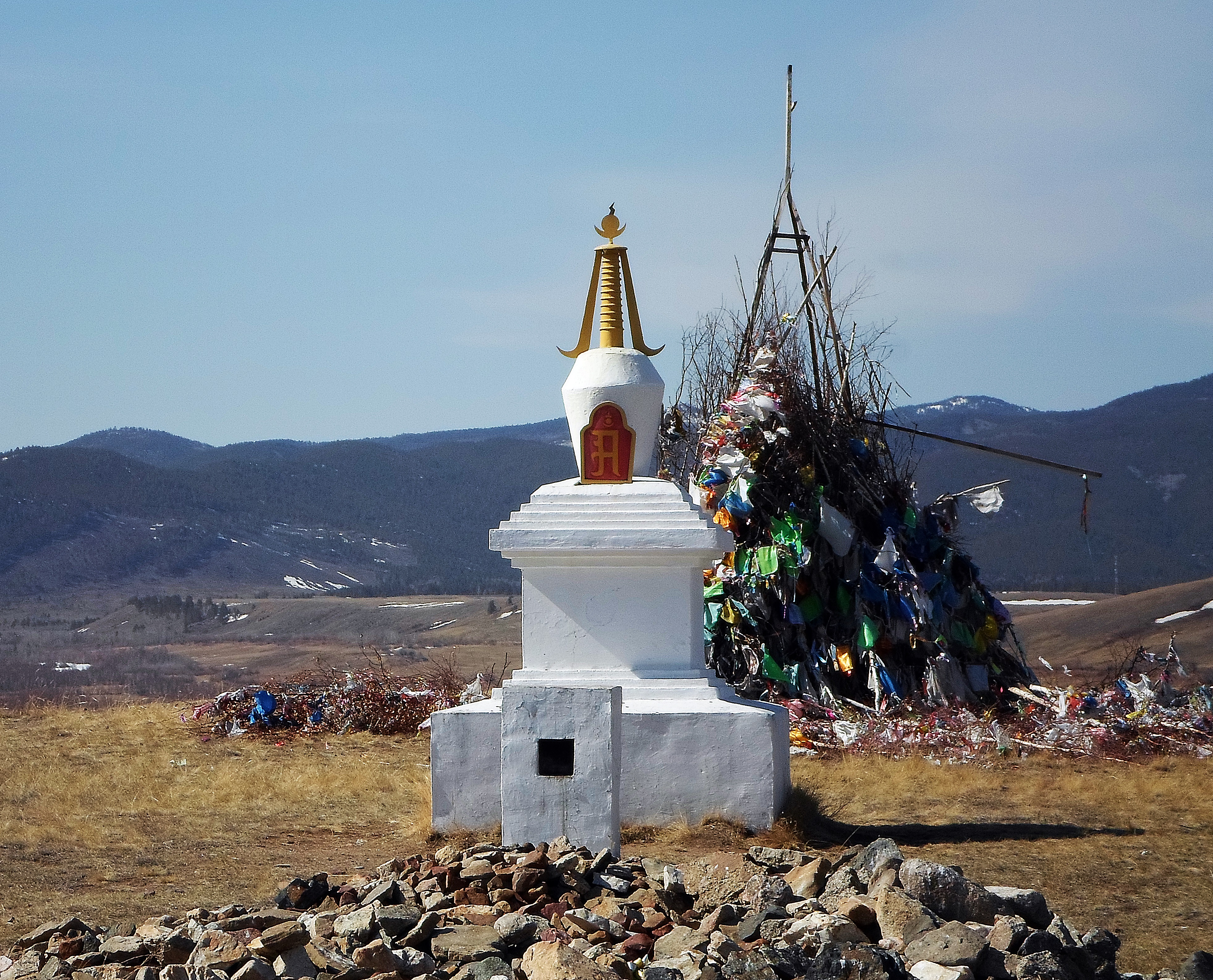 Ехэ обоо - Большое обо над Загустайской долиной. Селенгинский район Бурятии.